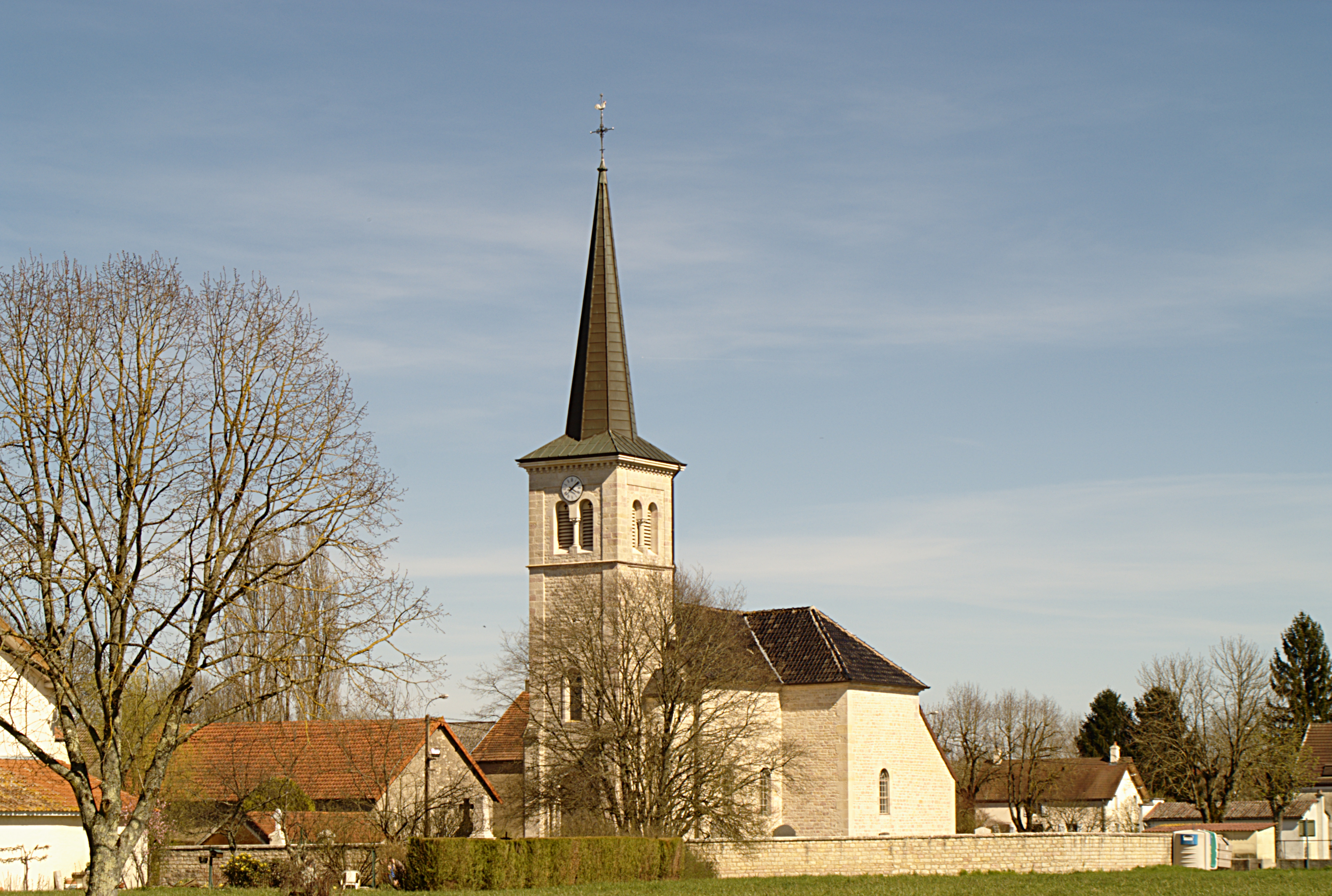 Église paroissiale Saint-Hippolyte, Aumur (Jura, Franche-Comté, France)